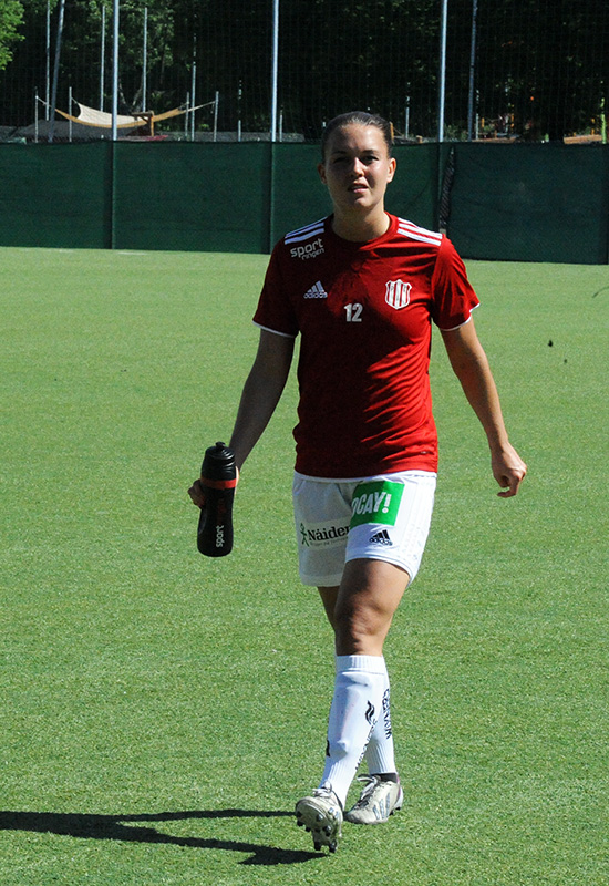 Emilia Appelqvist fotbollsspelare